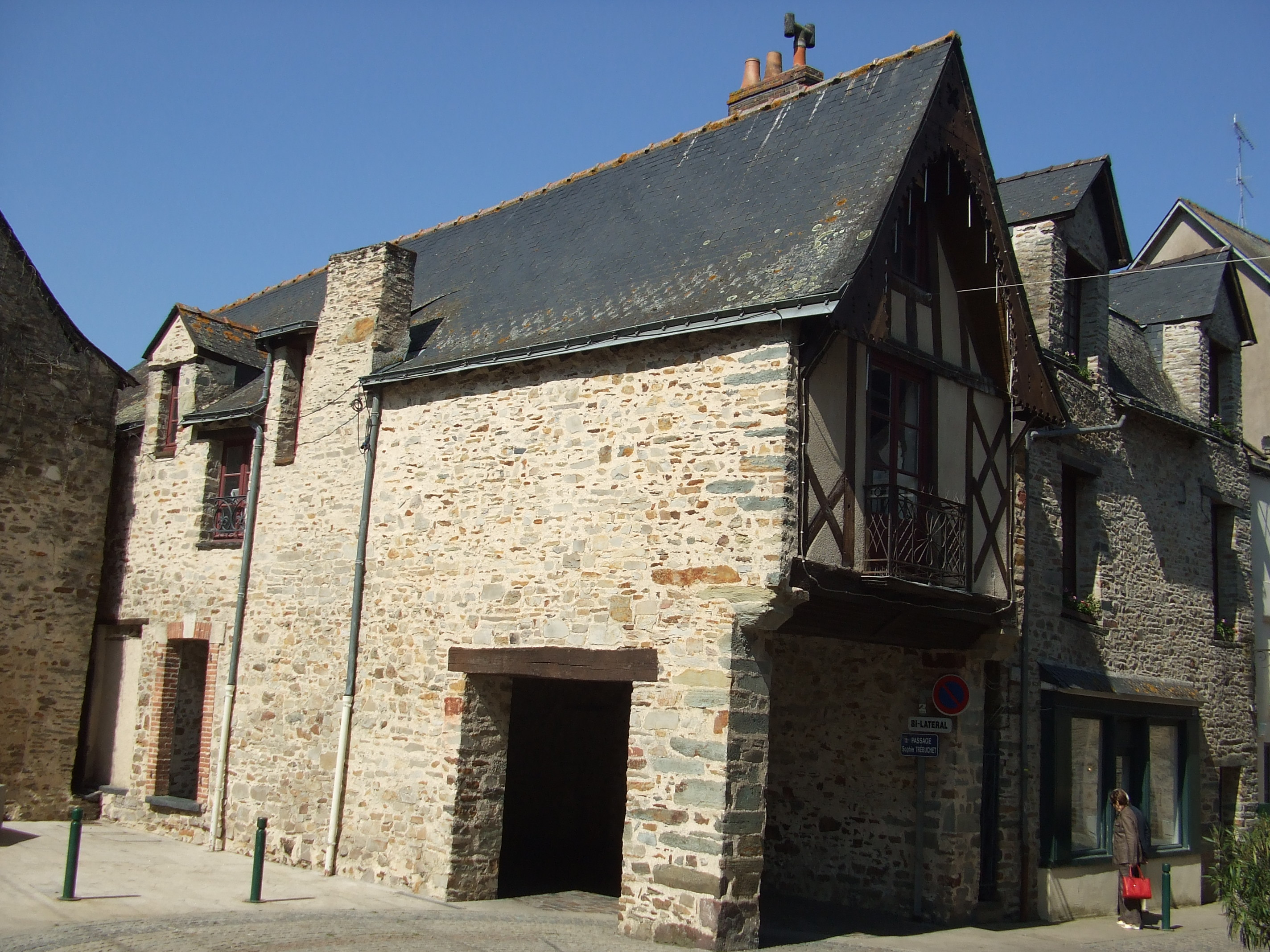 Châteaubriant - Rue de Couere (entrée du passage Sophie-Trébuchet)